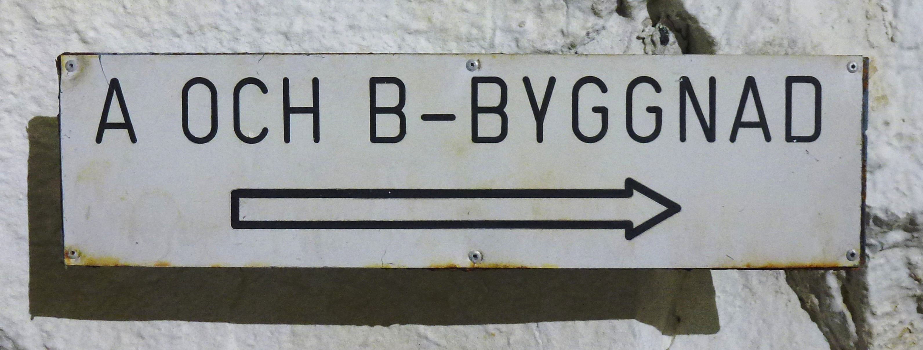 Ledningscentralen "Vargen" i Huddinge, skylt